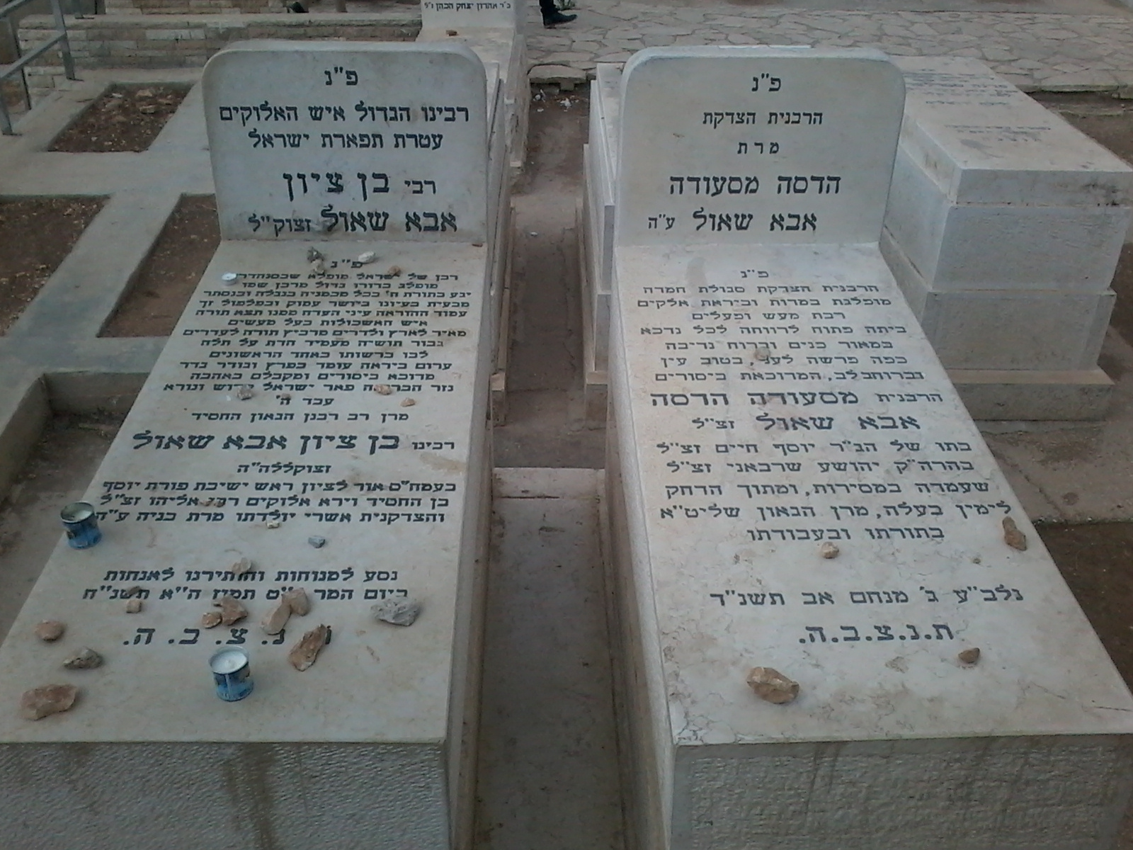 קברי הרב בן ציון אבא שאול ואשתו מסעודה הדסה בבית הקברות סנהדריה בירושלים